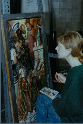 Restauratrice en plein travail